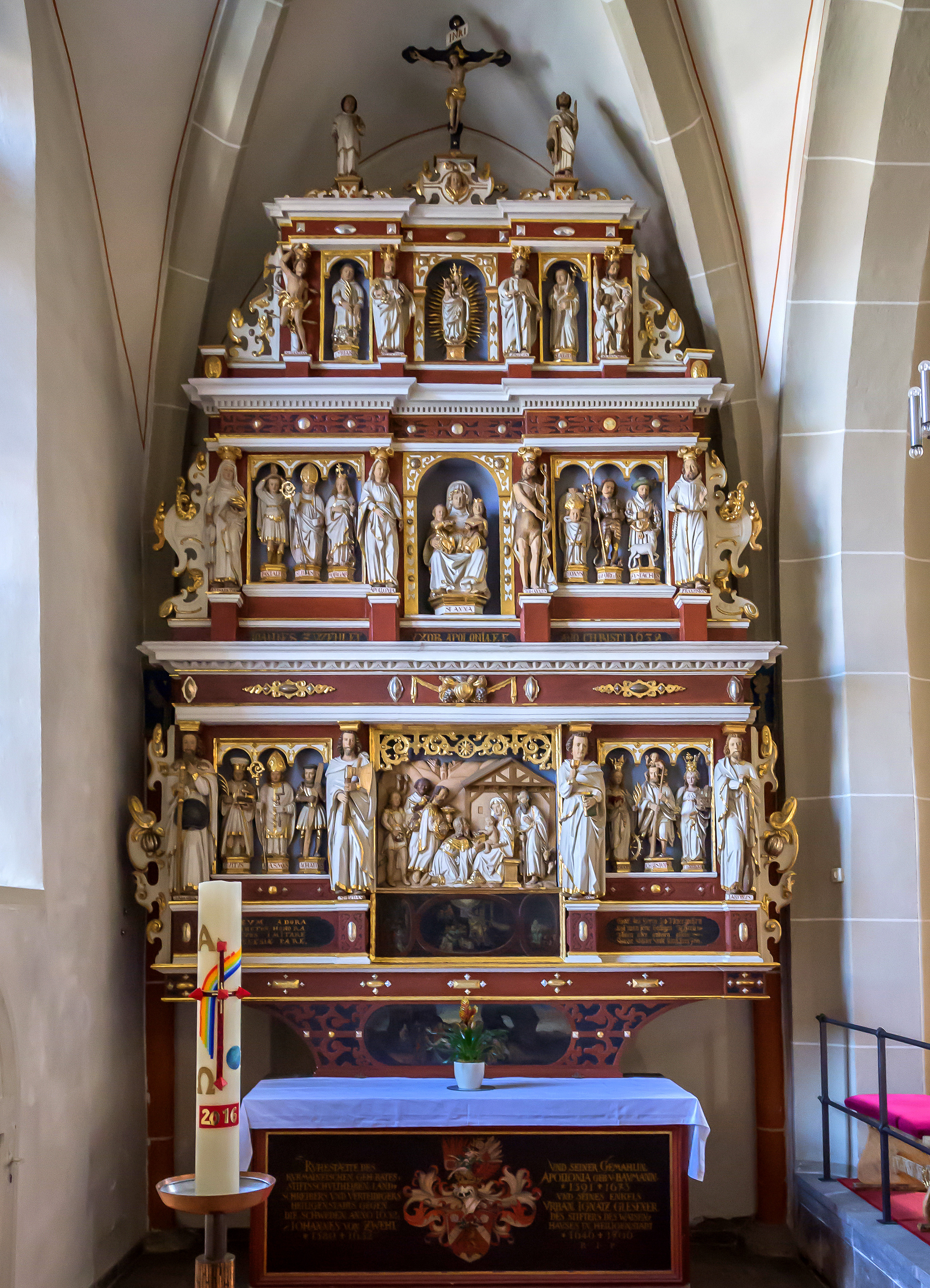 Heilbad Heiligenstadt Neustädter Kirchgasse 5 St. Ägidien Pfarrkirche (katholisch) Ausstattung linkes Seitenschiff.Der Vierzehn-Heiligenaltar ist das Prunkstück der Kirche und wurde 1638 im Renaissancestil für diese Kirche und diesen Ort geschaffen.Die Namenspatrone der Stifter,Apostelfiguren,die heilige Elisabeth,der heilige Franziskus und weitere heilige flankieren in Nischen die 14 Nothelfer zu denen auch der heilige Ägidius gehört.Johannes von Zwehl der Stadtschultheiß gelobte den Altar für seine Errettung im 30jährigen Krieg.